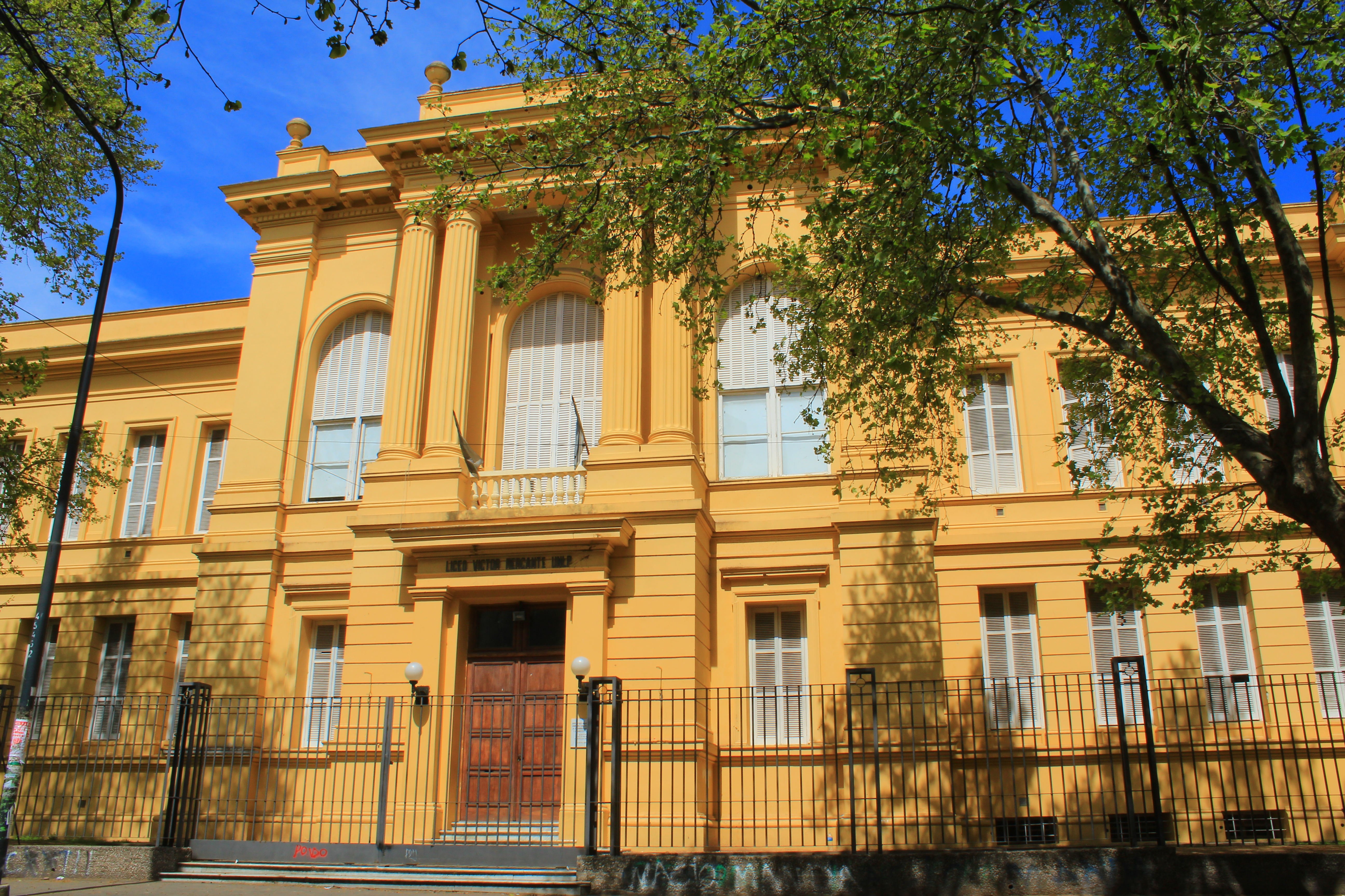 Escuela Graduada Liceo "Victor Mercante"